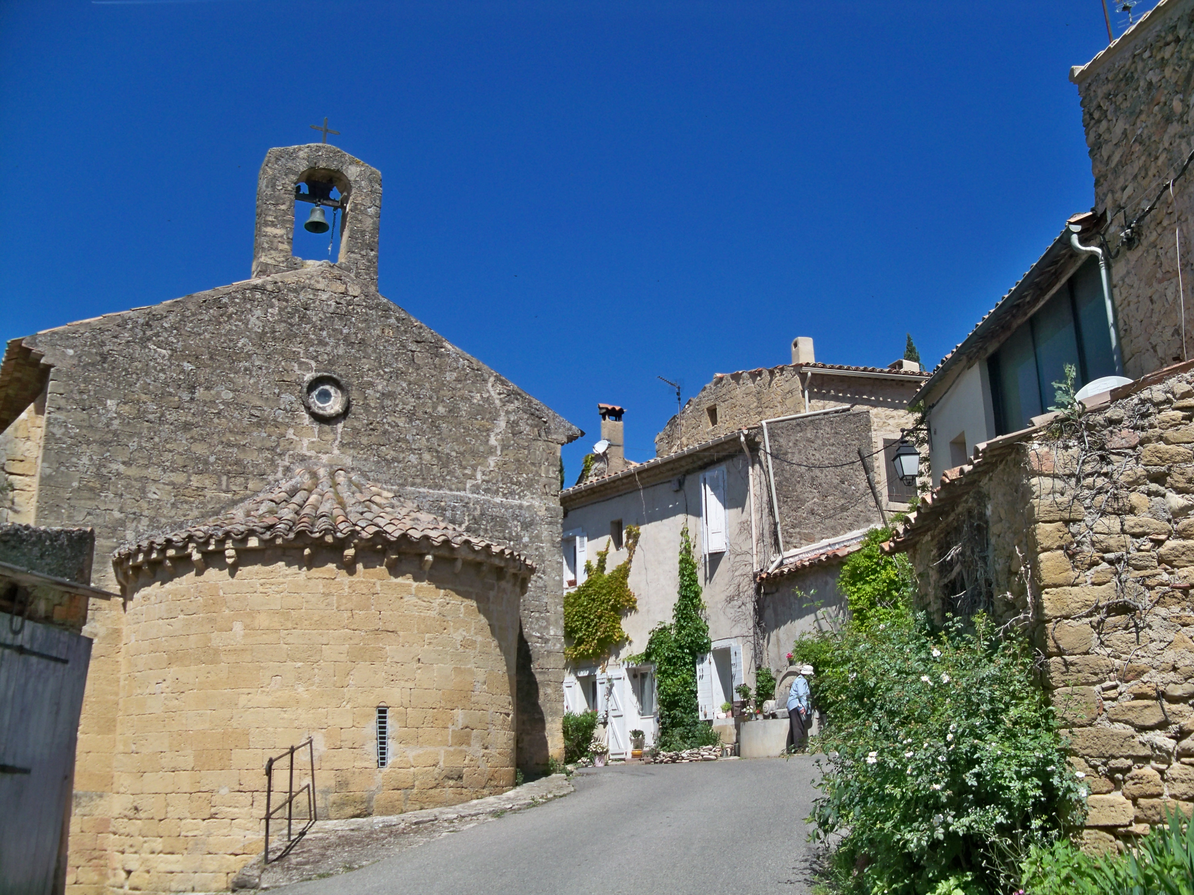 rue à Puget (84)